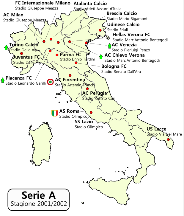 Distribuzione geografica squadre Serie A 2001-2002